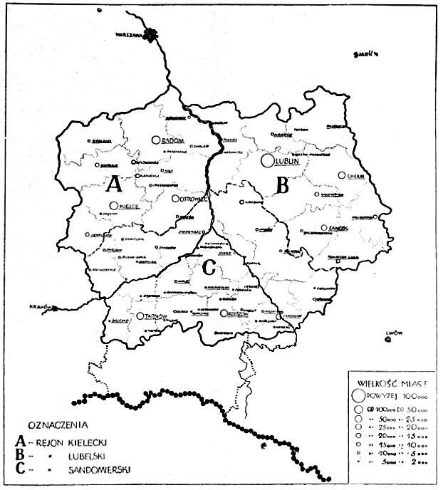 Centralny Okręg Przemysłowy (1938)